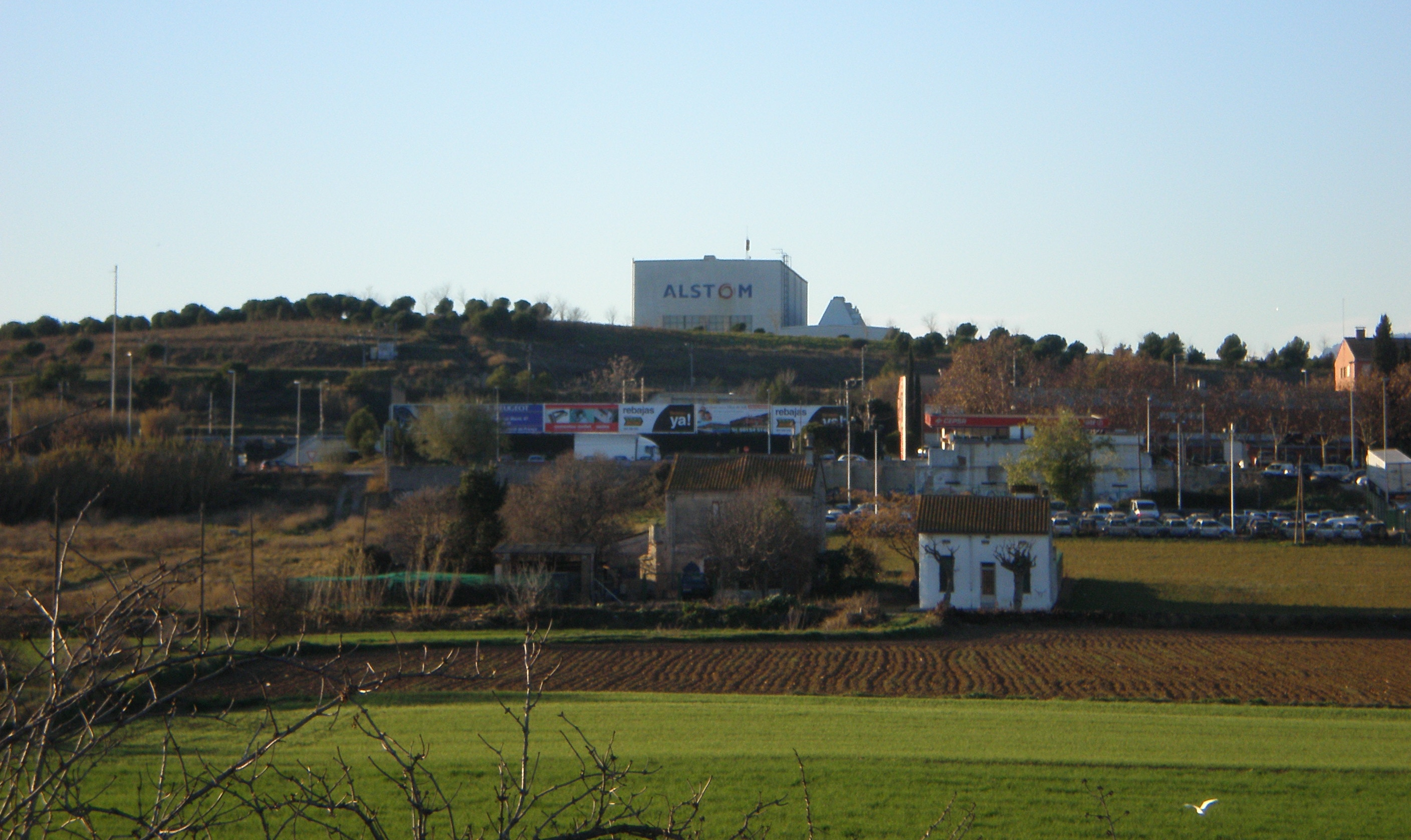 La factoría Alstom de Santa Perpètua de Mogoda vista desde El Calderí en Mollet del Vallès (Vallès Oriental, provincia de Barcelona, Cataluña).